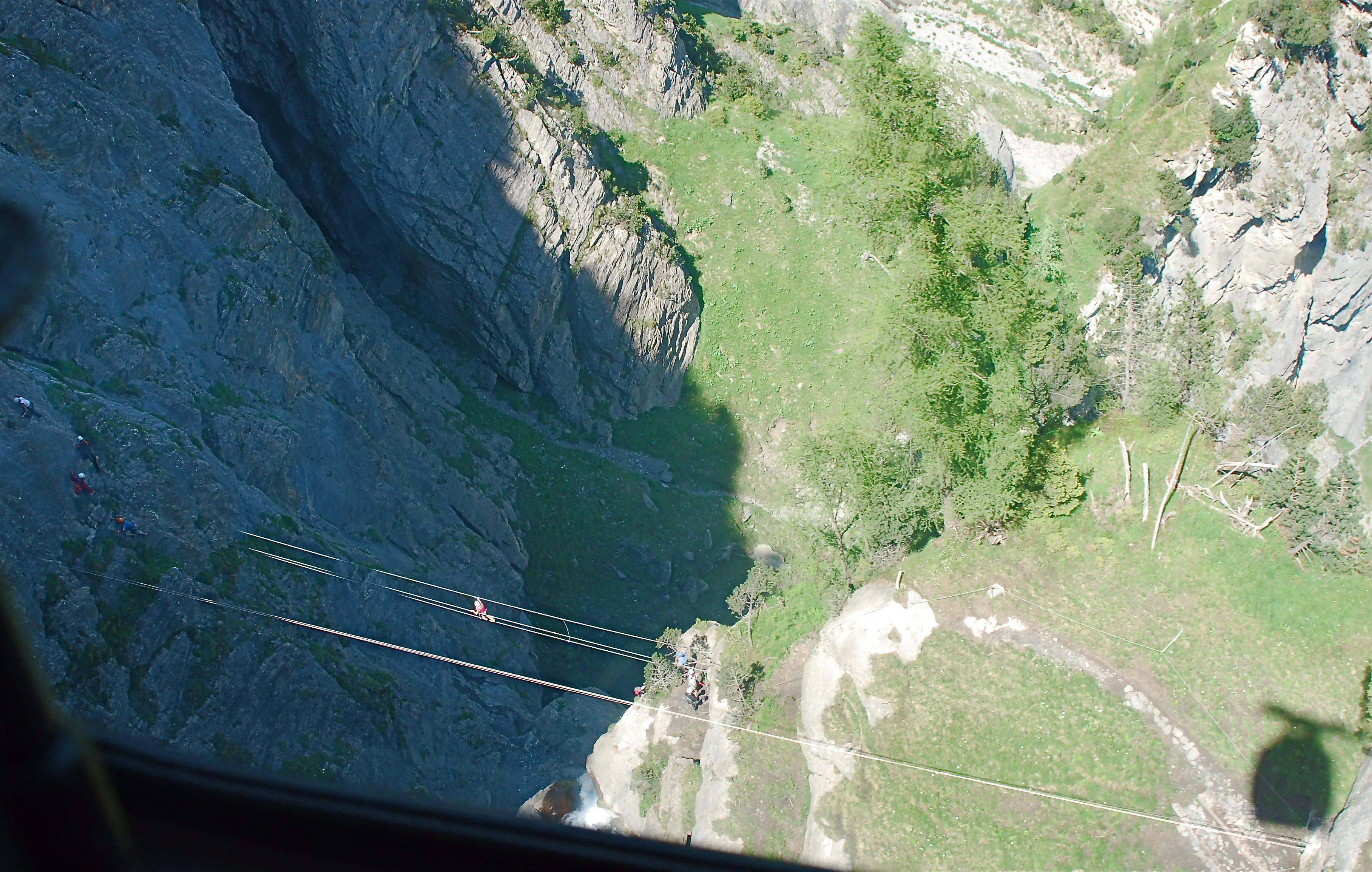 Almenalp Klettersteig